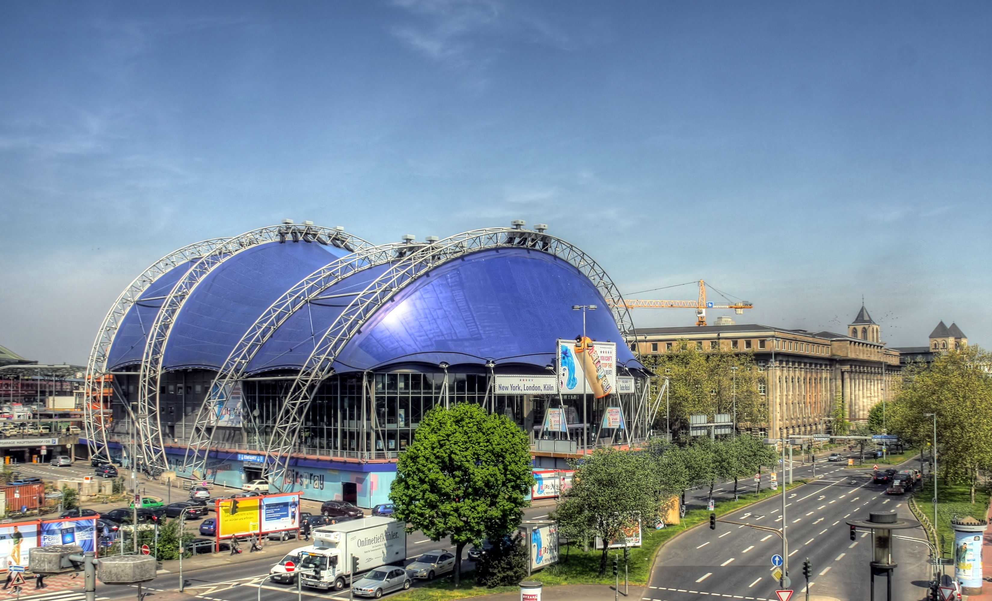 Musical Dome Köln